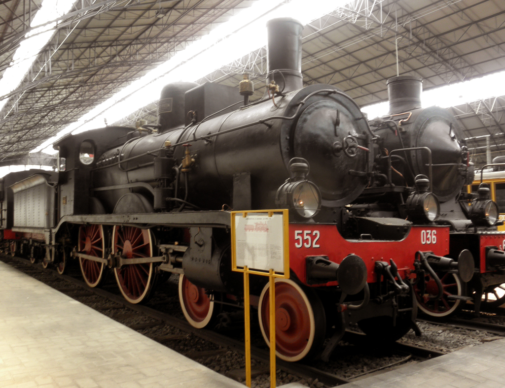 Locomotiva a vapore 552.036 delle Ferrovie dello Stato, esposta al Museo della Scienza e della Tecnologia di Milano